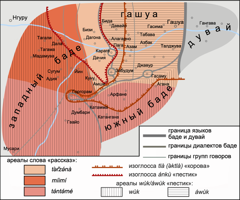 Лексические изоглоссы диалектов языка баде (Нигерия). Источники: Schuh, Russell G. Using dialect geography to determine prehistory: A chadic case study // Spracheund Geschichte in Afrika. — 1981. — P. 240.